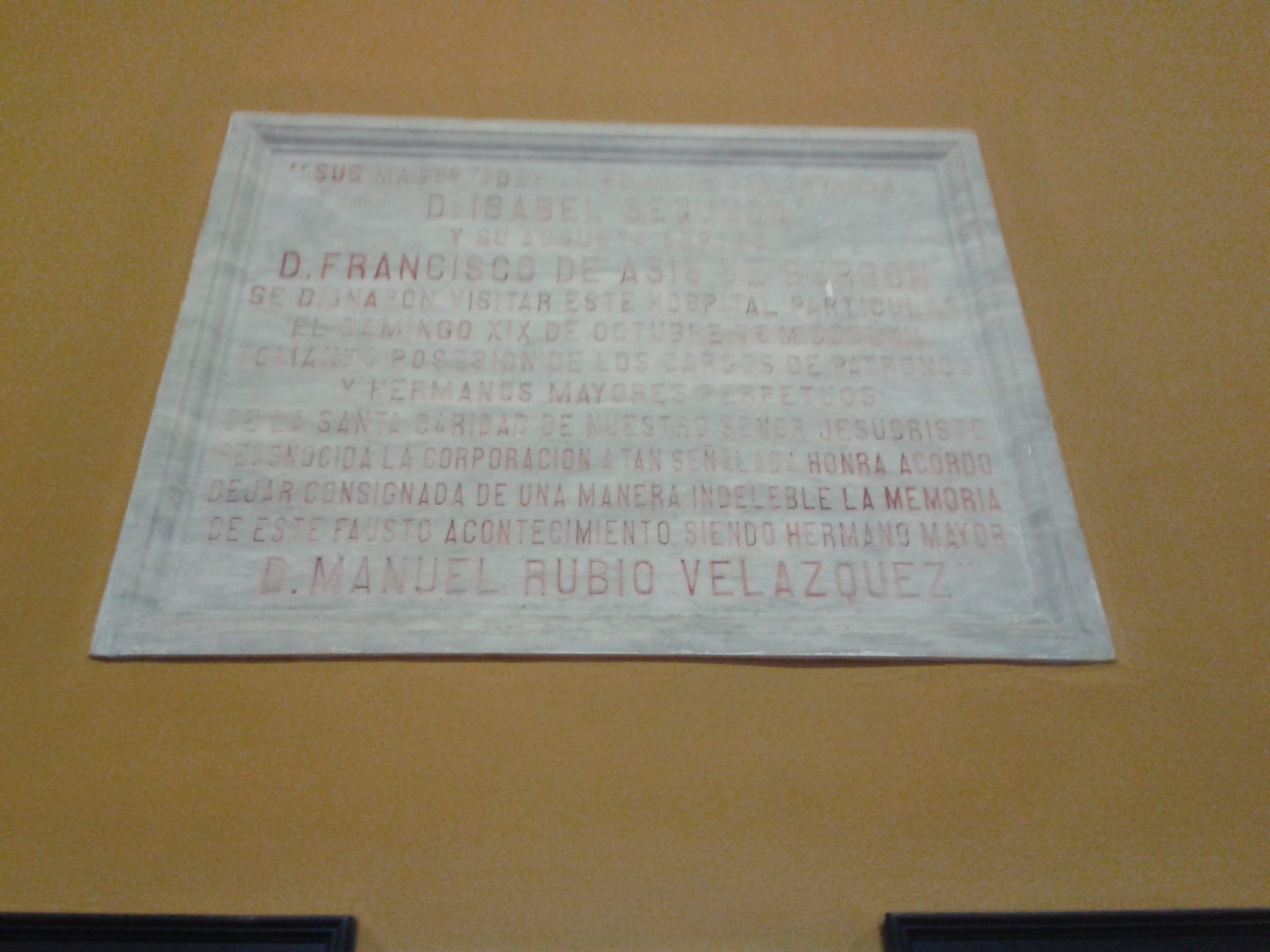 Placa que recuerda la visita de Isabel II de España y su consorte al antiguo Iglesia-Hospital de San Julián, en Málaga (España).